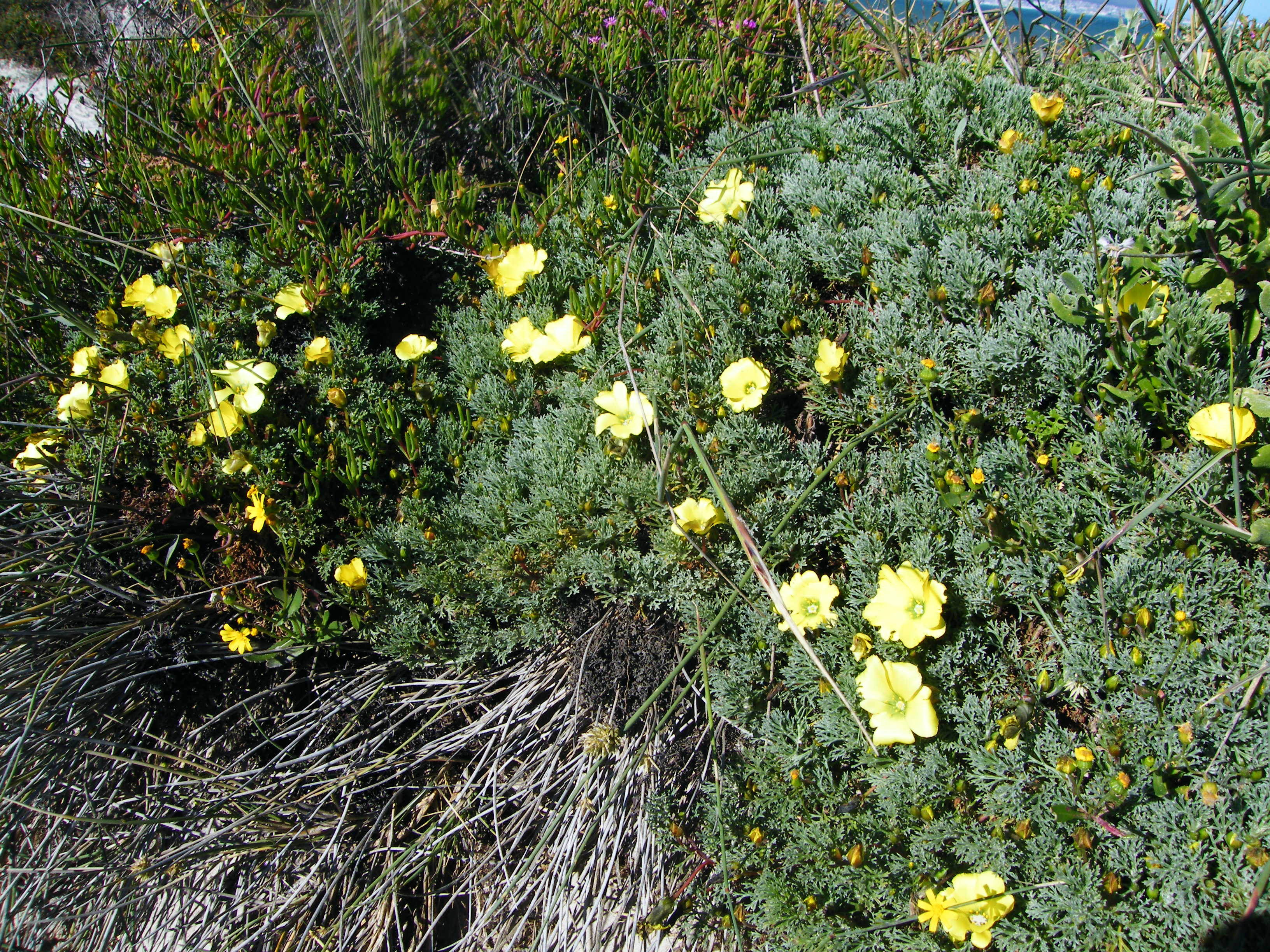 Duikerwortel